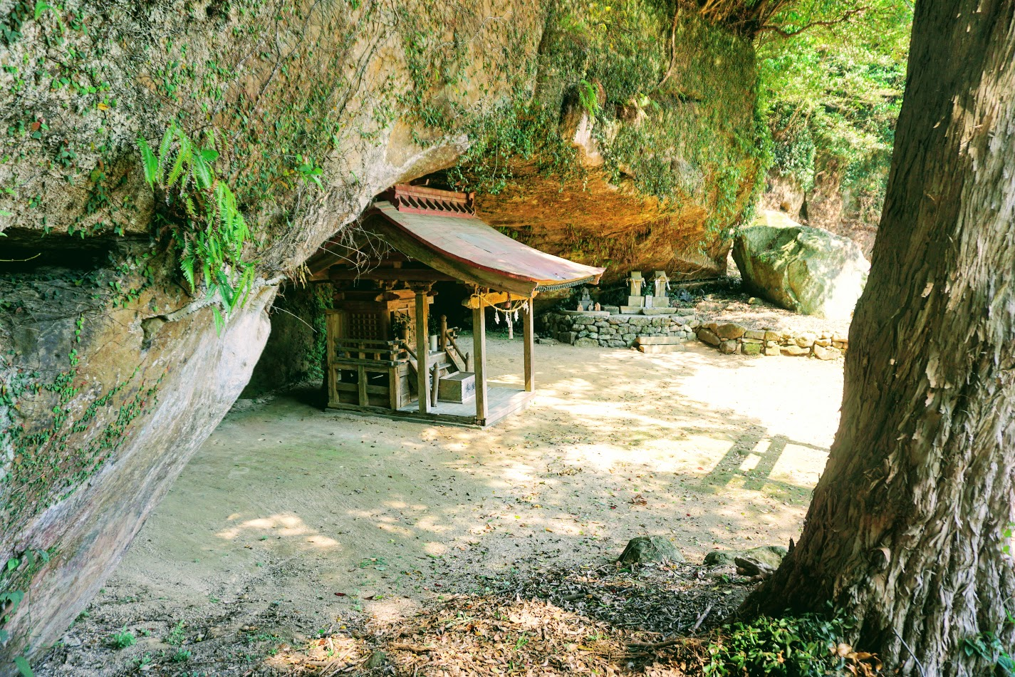 長崎県佐世保市にある福井洞窟。